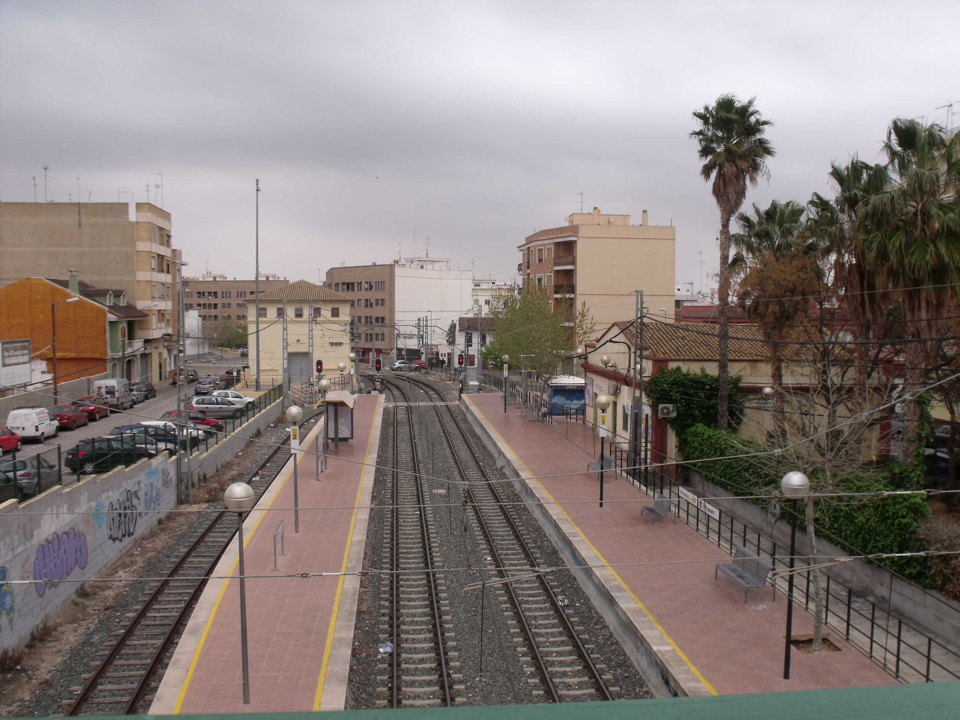 Estación Metro Valencia,Picassent